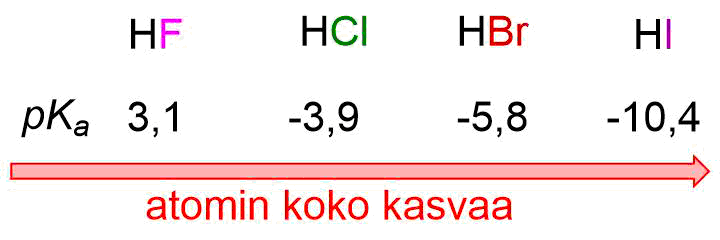 Vetyhalidien (HF, HCl, HBr, HI) happovoimakkuus kasvaa halidin koon kasvaessa